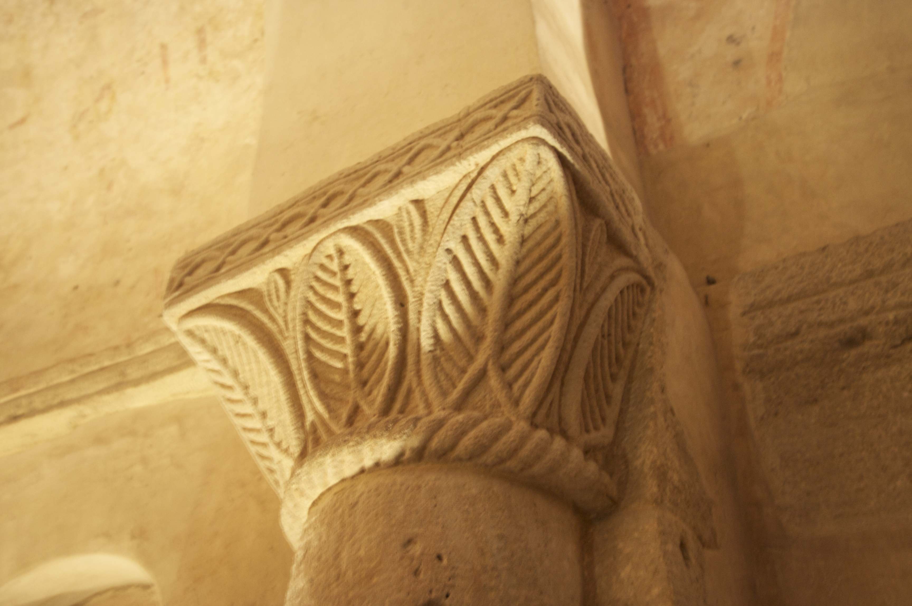 Iglesia de San Salvador (Priesca)